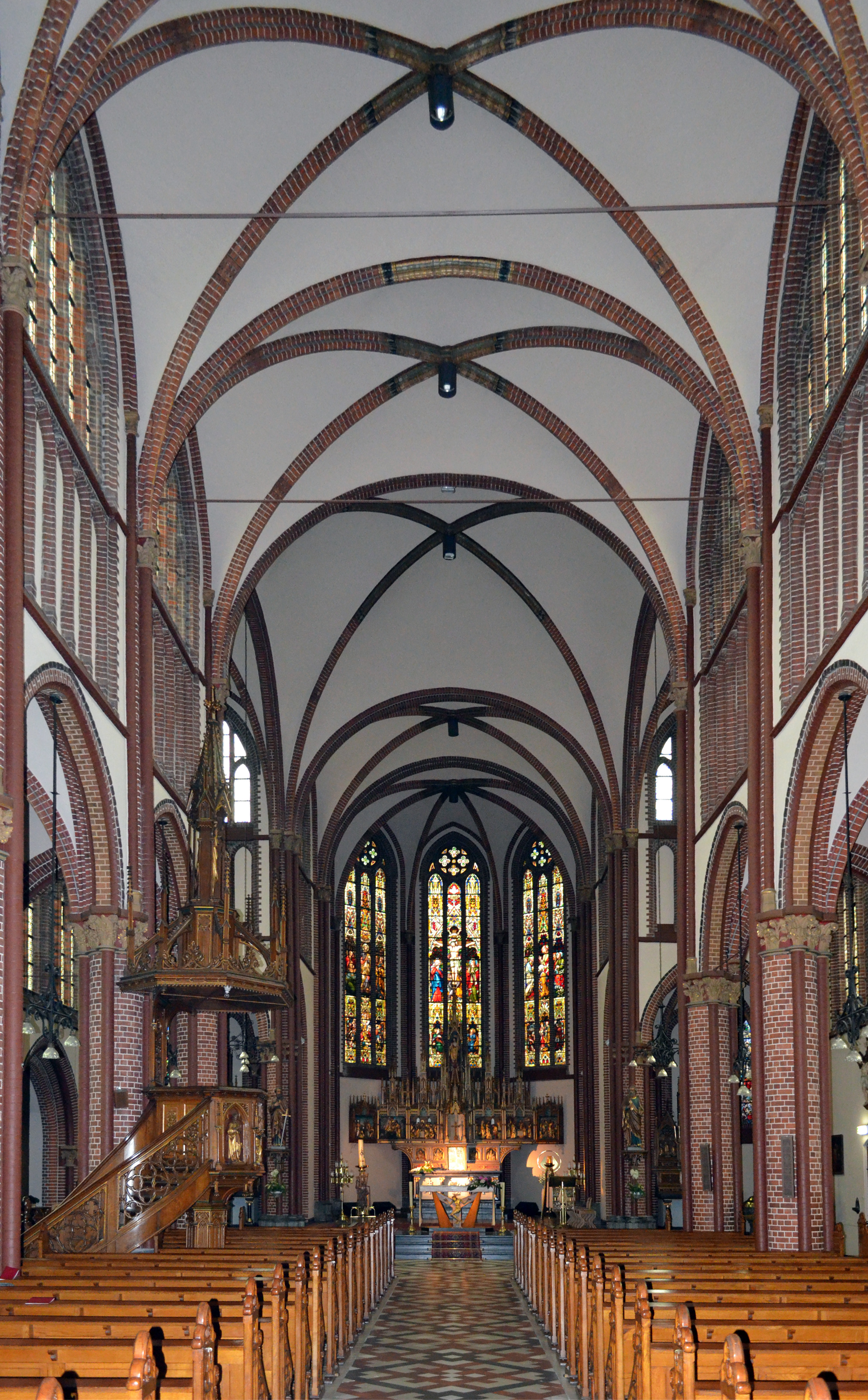 Innenansicht der Sankt-Pauls-Kirche in Vaals, Mittelschiff